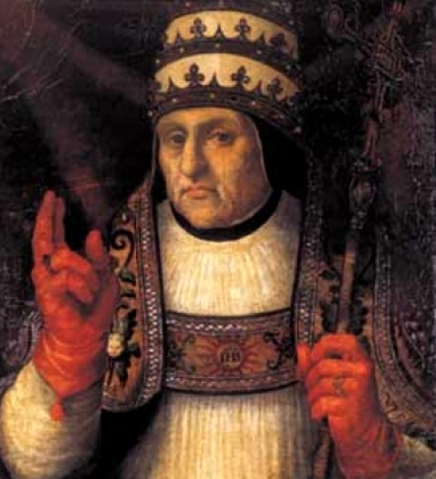 Retrato del eclesiástico español Alfonso de Borja y Cavanilles (1378-1458), que posteriormente llegaría a ser papa de la Iglesia Católica con el nombre de Calixto III.